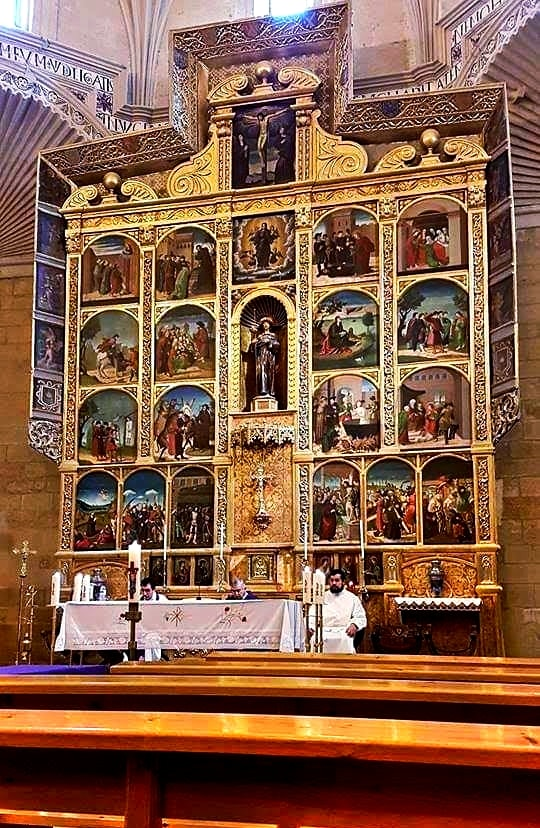 Aragonés: Retablo de Granyén.